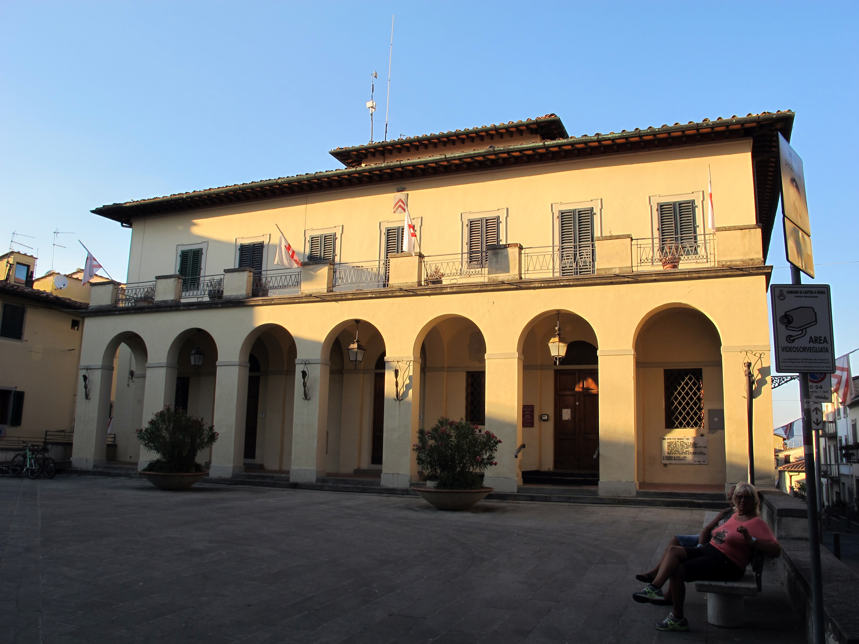 Town hall (Lastra a Signa)